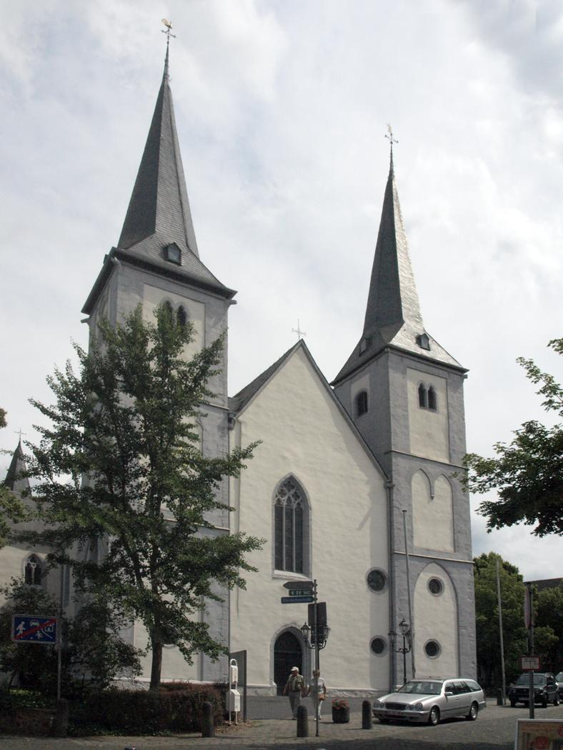 Montabaur, St. Peter in Ketten, Fassade Foto 2013